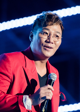 160903 썸데이페스티벌 바이브 윤민수 직찍